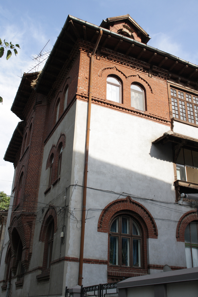 Casă, Str. Sevastopol 10 sector 1